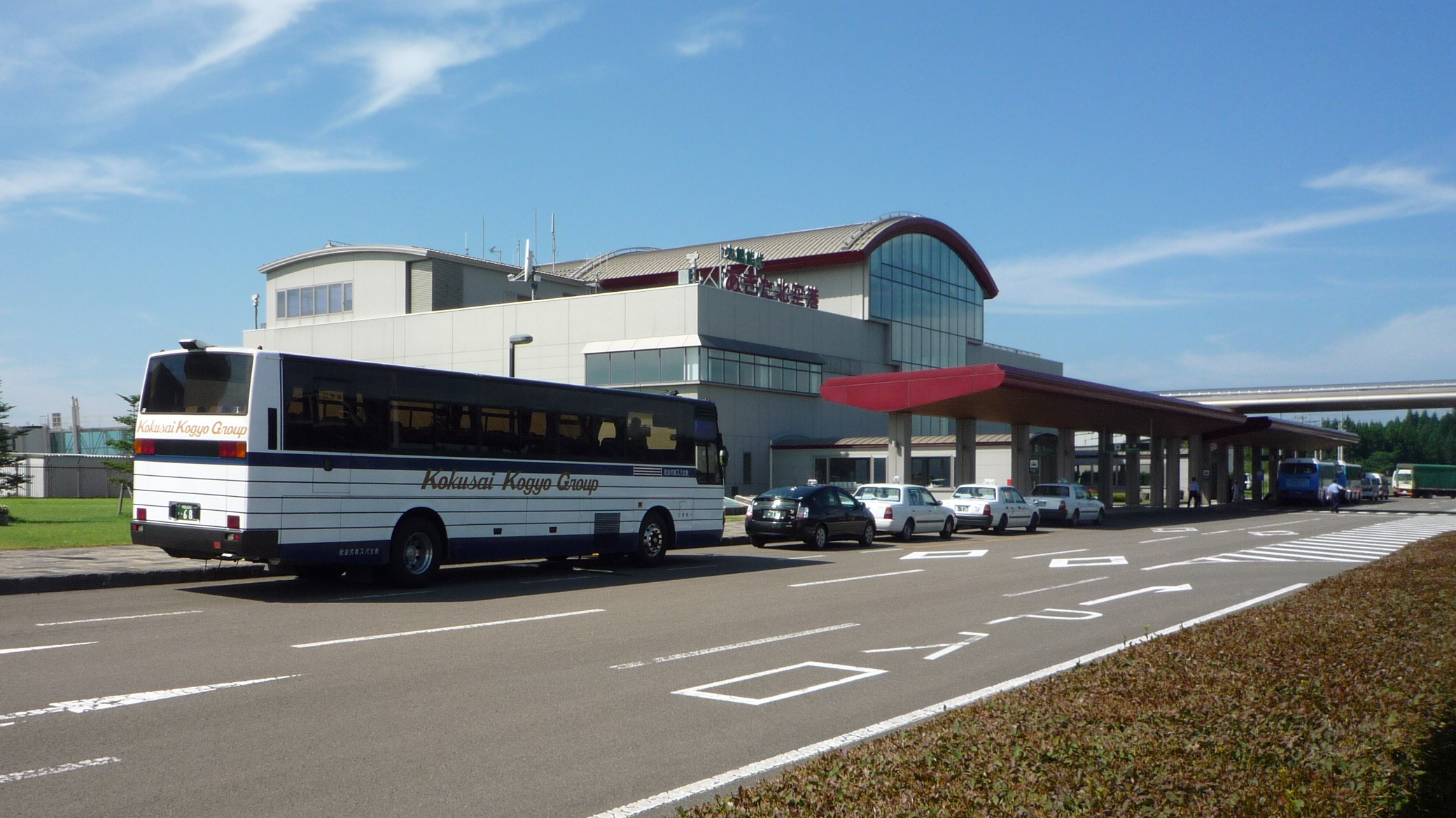 大館能代空港 旅客ターミナル